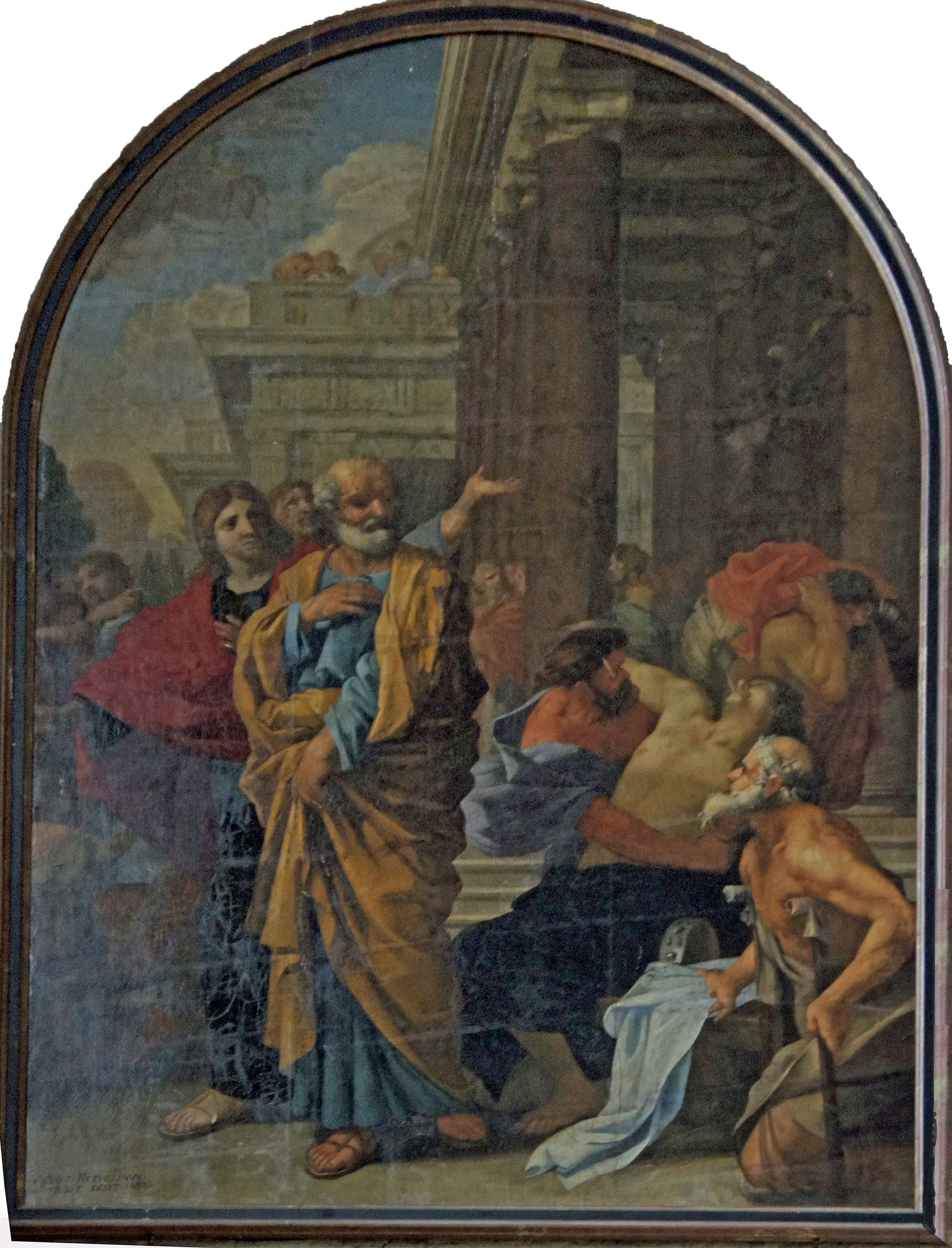 1638 en l'Église Saint-Nicolas de Rethel ;Recensé au patrimoine .